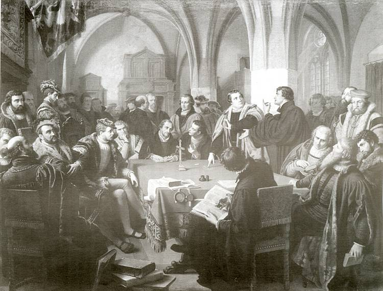 Abbildung von August Noack: "Marburger Religionsgespräch" - Szene des Marburger Religionsgesprächs zwischen Luther und Zwingli im Jahre 1529 - Ölgemälde (2,50 x 3,05 m)